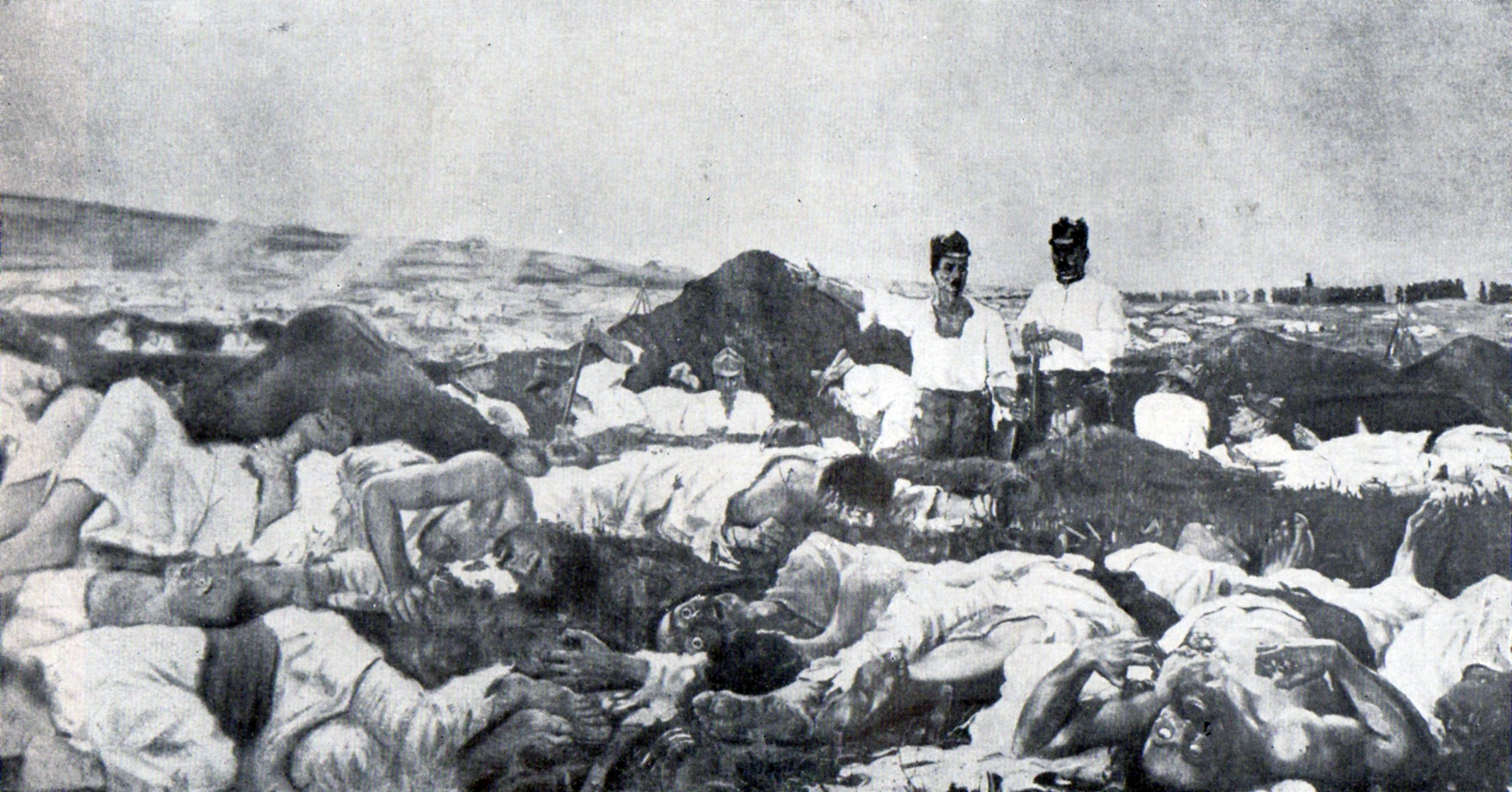 Înmormântarea